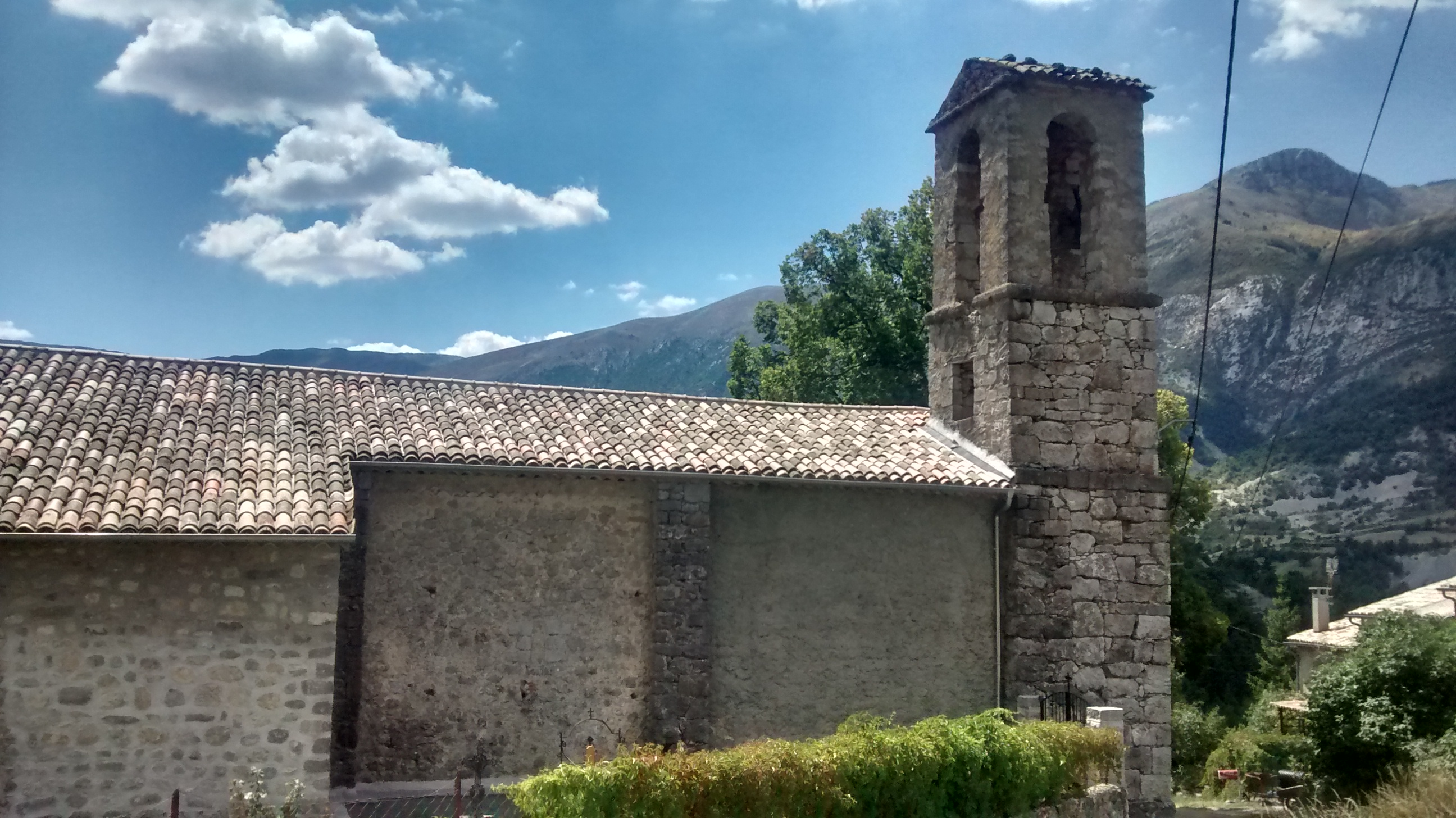 église Saint-Symphorien à Blieux